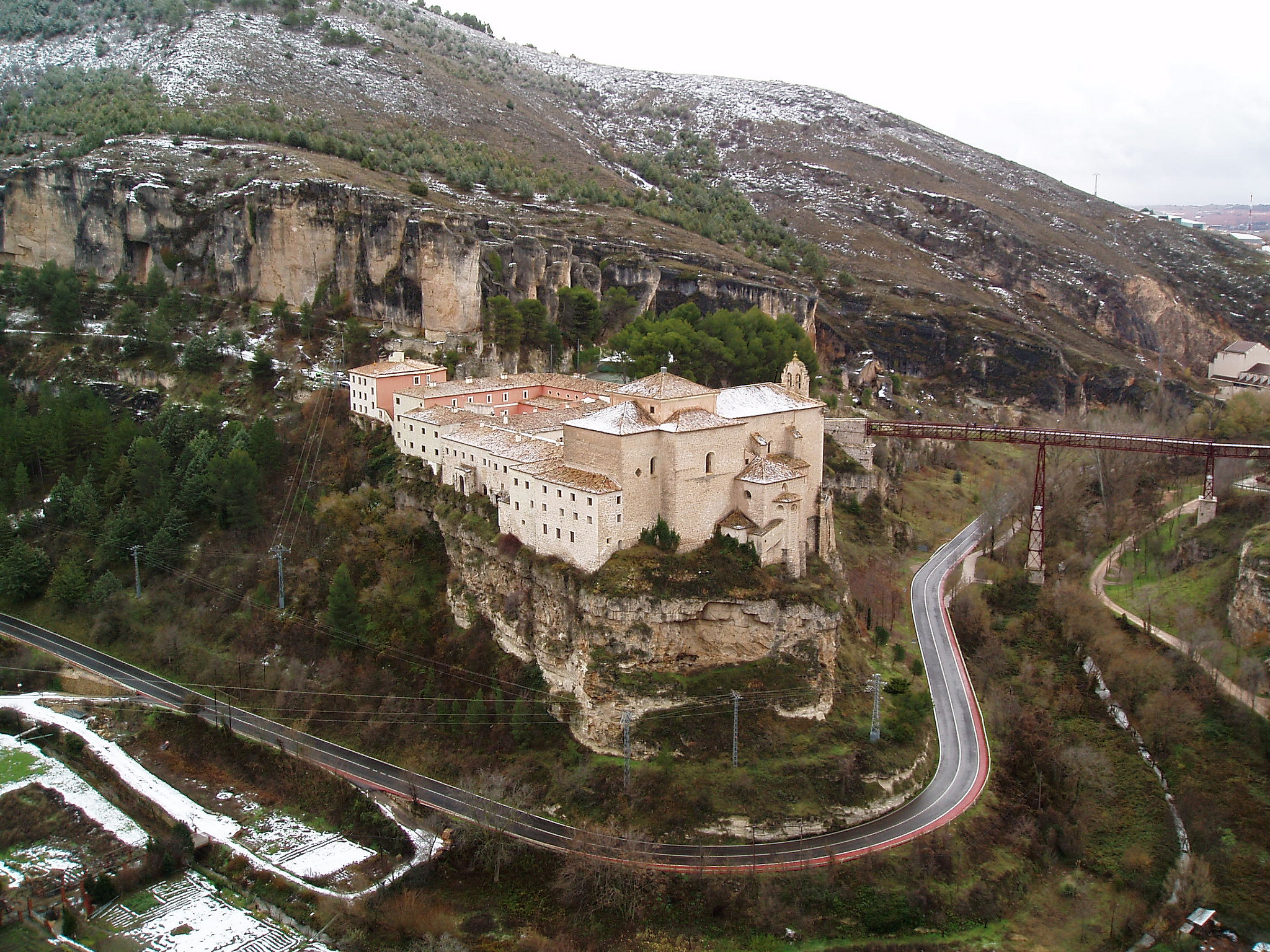 Convento de San Pablo, Cuenca.